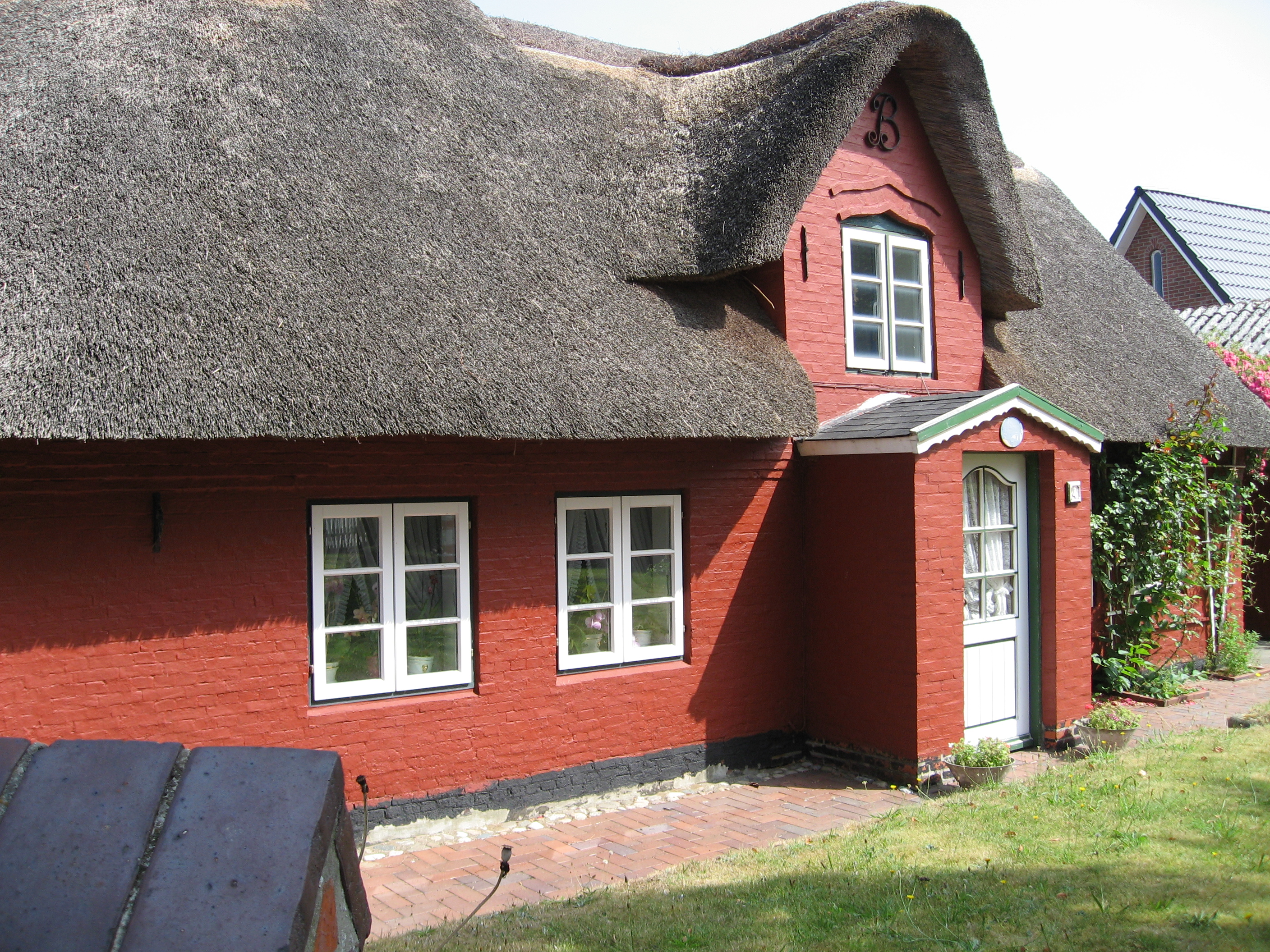 Amrum, Norddorf, friesische Architektur